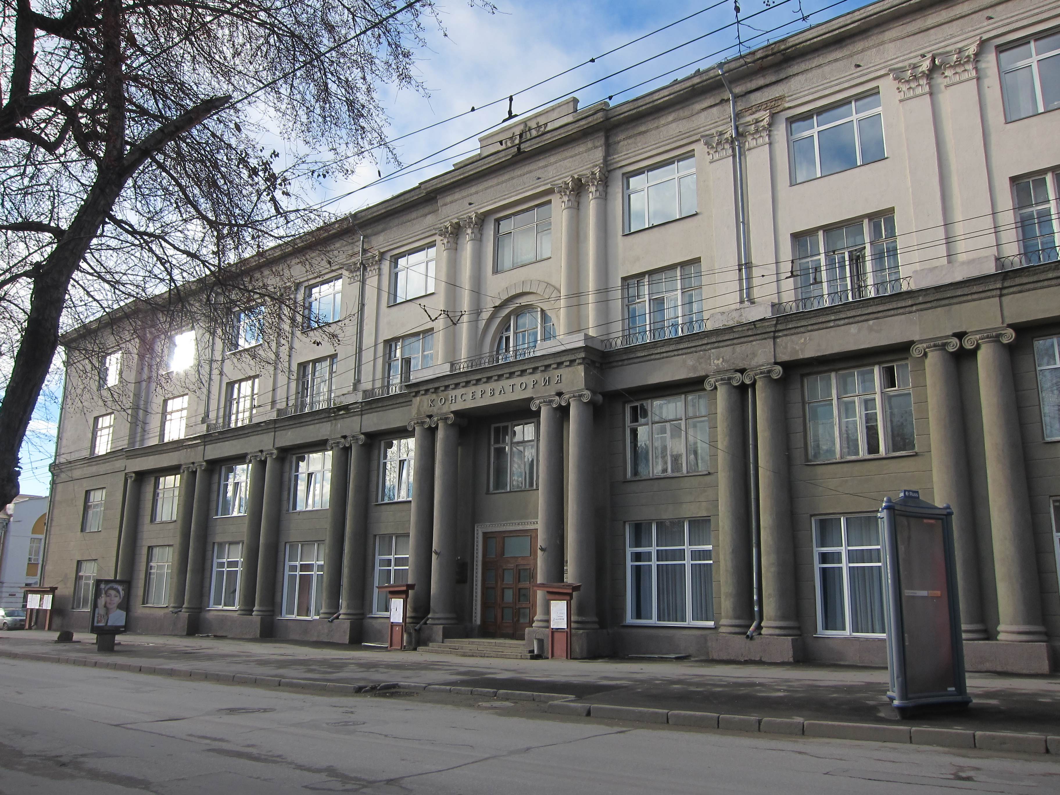 Новосибирская государственная консерватория имени М. И. Глинки (ул. Советская, 31)